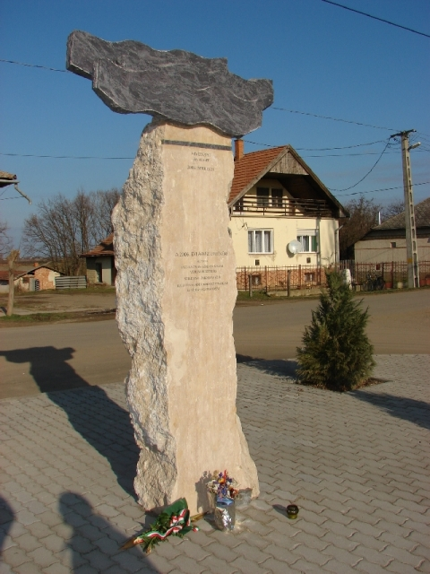 Szelevényen a 2006-os árvíz emlékére állított emlékmű